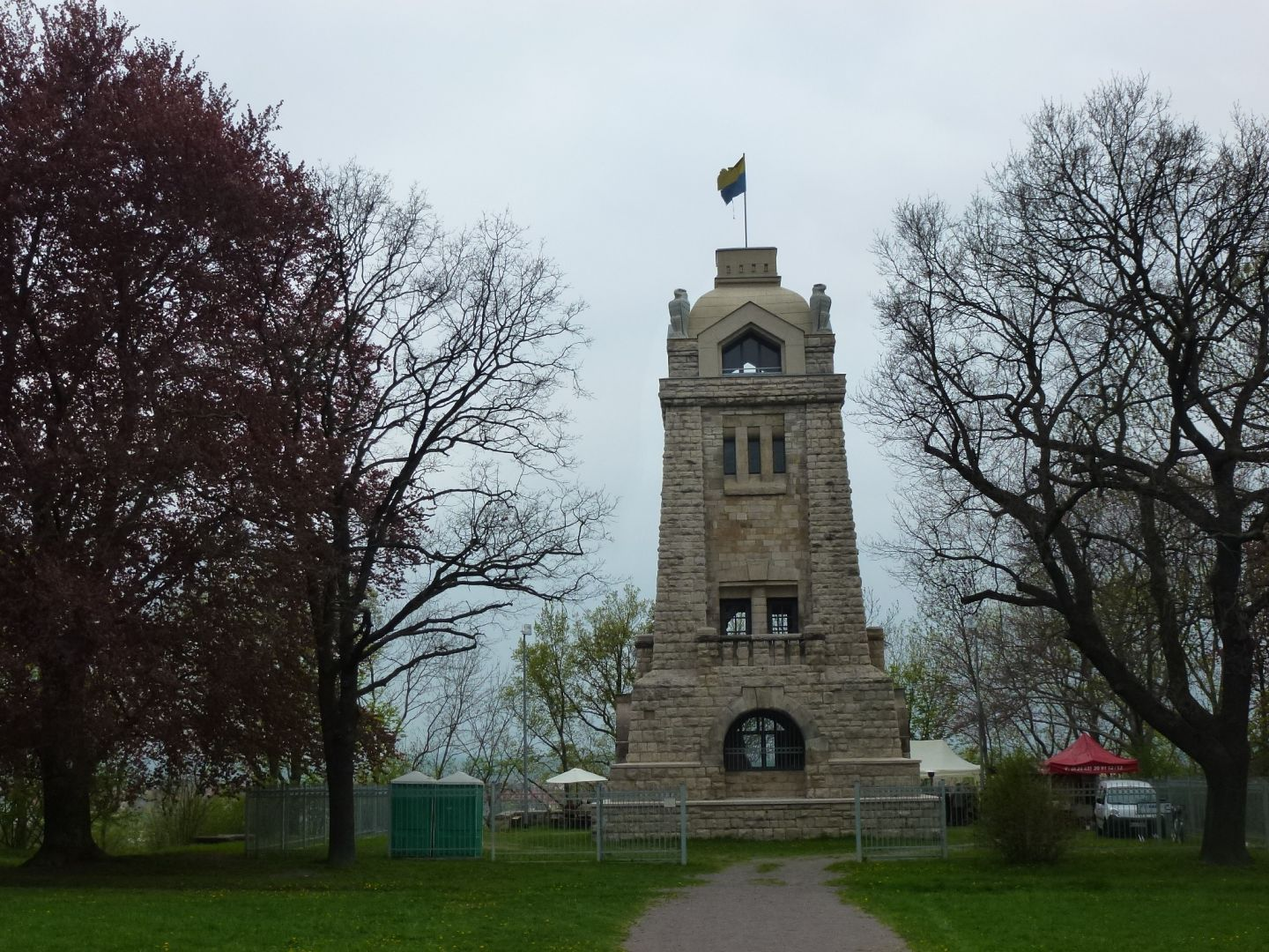 Bismarckturm in Weißenfels